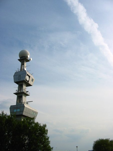 Wetterradar. Ort: Emden